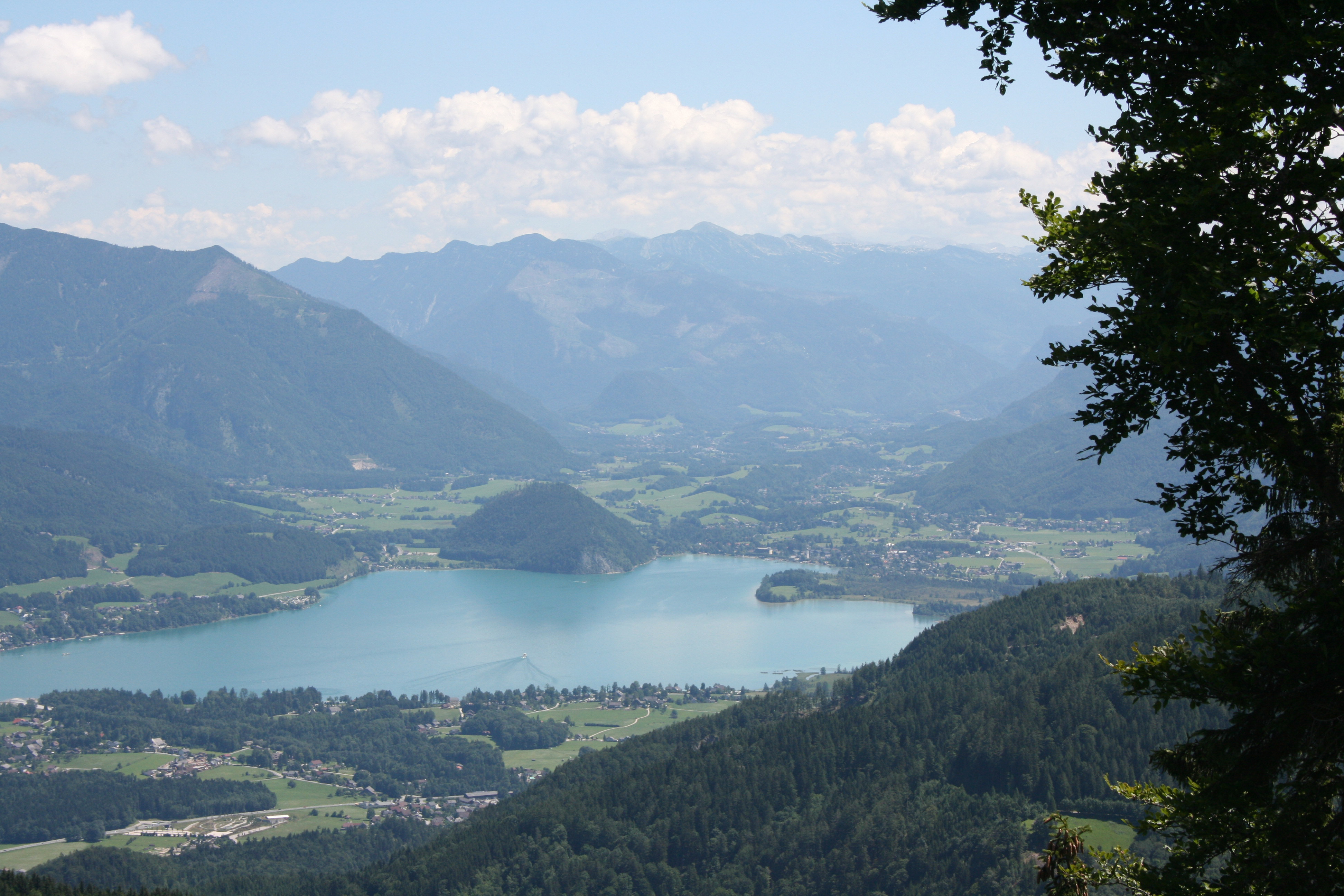 Blick auf Strobl vom Zwölferhorn; im Vordergrund das Gebiet der KG Gschwendt; oberer Bildbereich: Berge und obere Talhälfte gehören zur Gemeinde Bad Ischl.